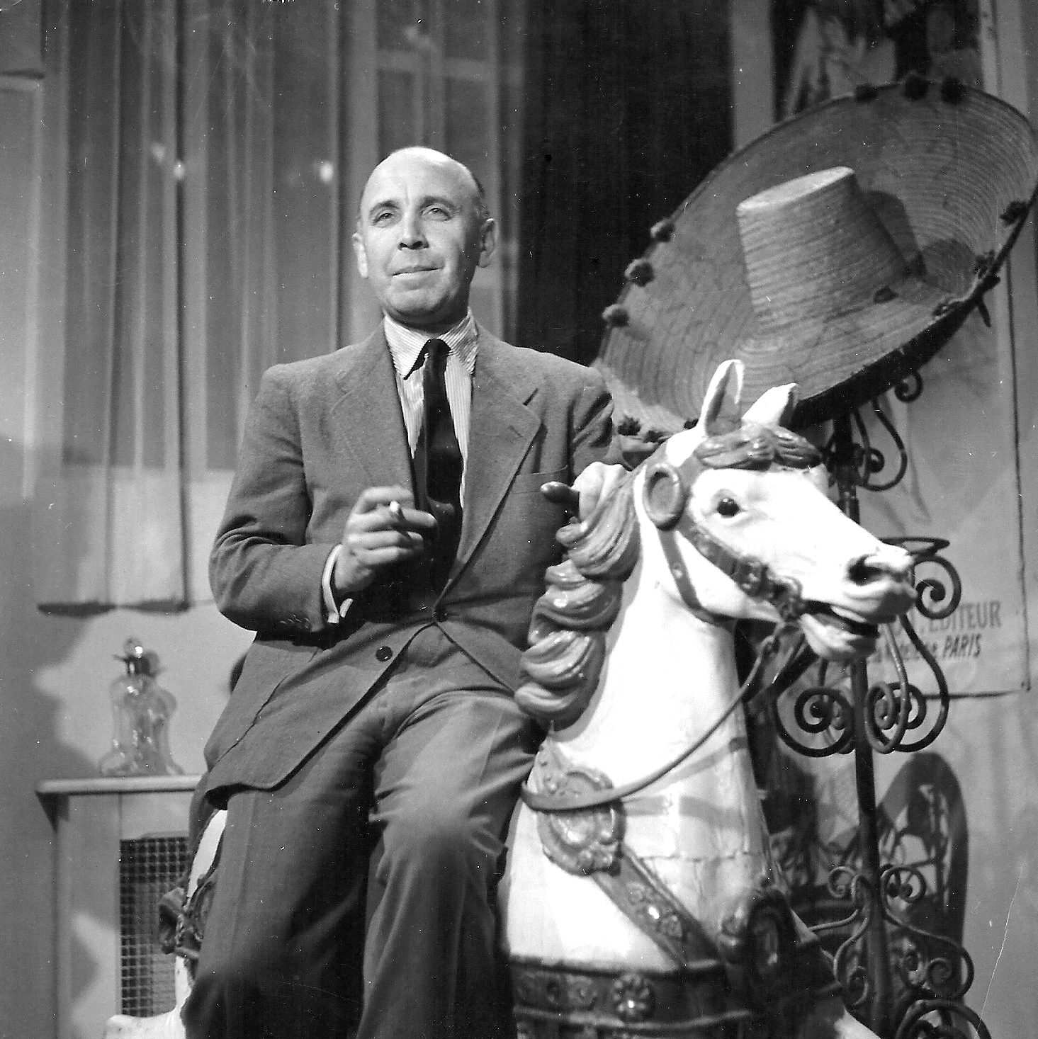 Emil-Edwin Reinert lors d'un tournage à Paris. / during production in Paris. / während Dreharbeiten in Paris.